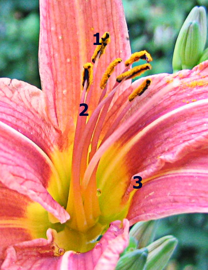 аутор Снежана Трифуновић Цвет